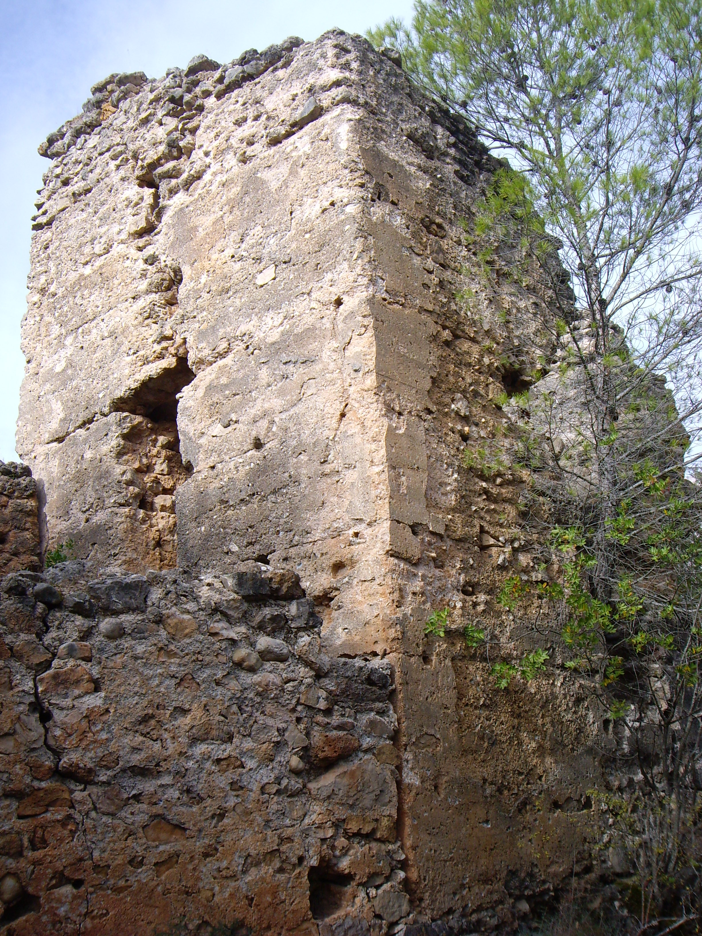 Castillo de Bujaraiza